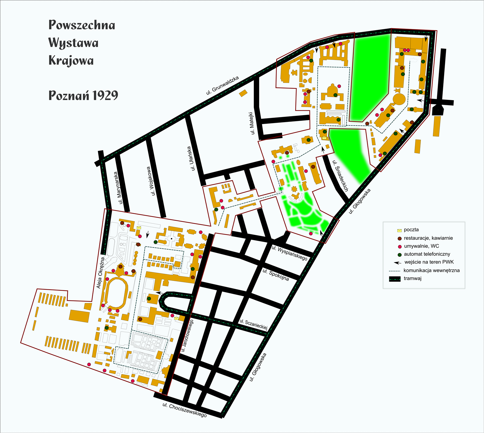 Plan Powszechnej Wystawy Krajowej 1929 Poznań. Na podstawie przewodnika po PWK i współczesnego planu miasta. Wersja o dłuższym boku 1600px